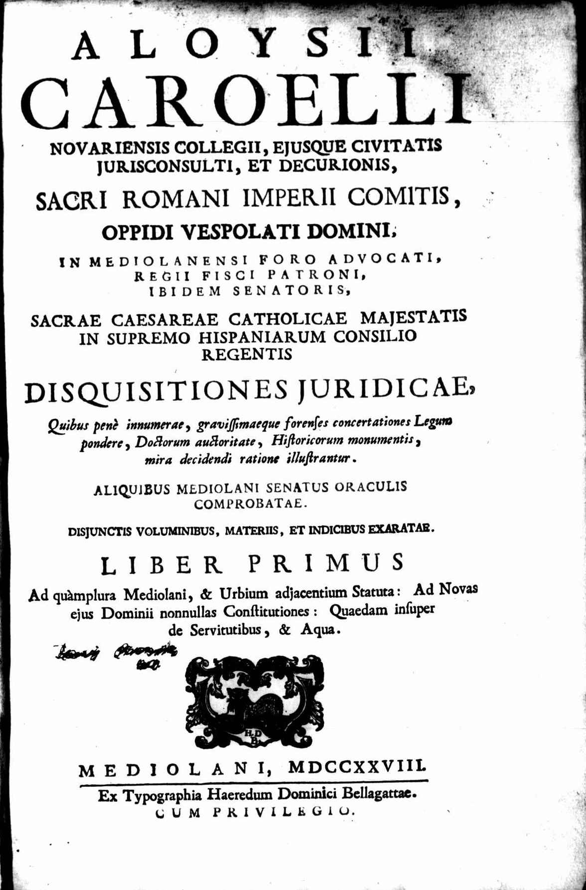 Frontespizio